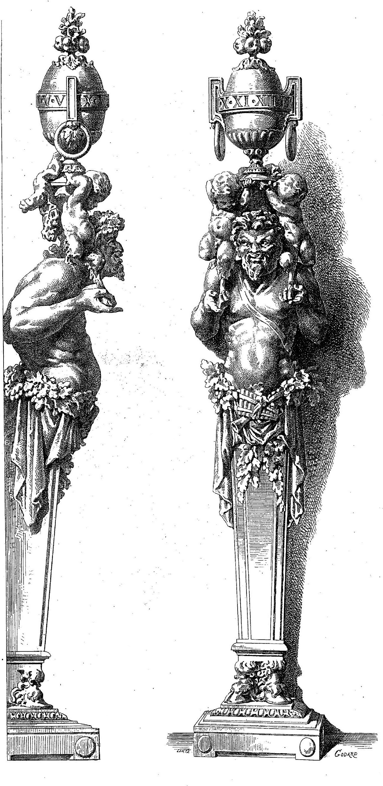 Illustration d'un modèle de pendule-gaine, d'après un original en plâtre.